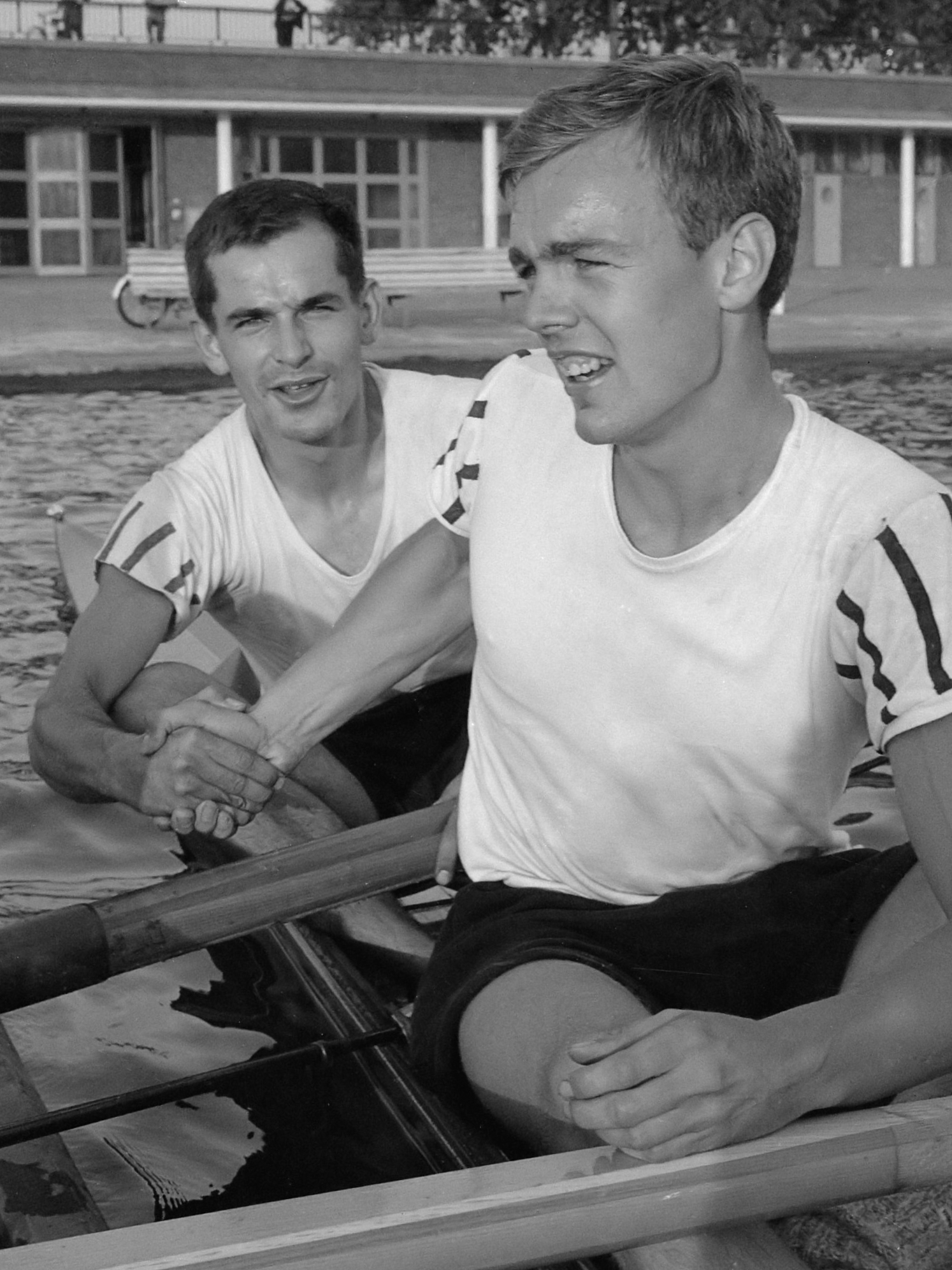 Nationale kampioenschappen roeien op de Bosbaan voor heren de twee zonder stuurman Blaisse en Veenemans (Nereus) 24 juli 1964